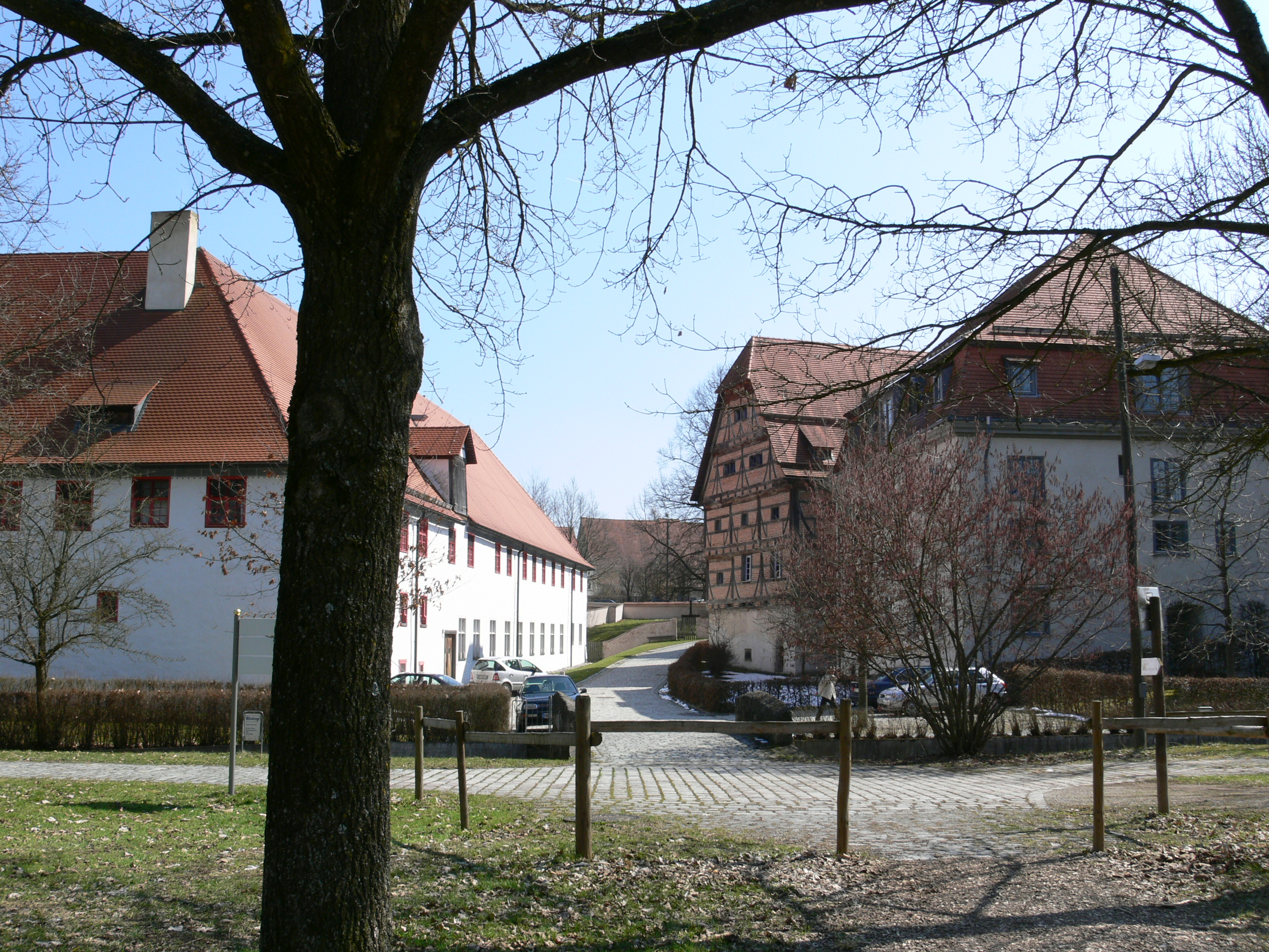 Kloster Heiligkreuztal links: ehemaliges Konventsgebäude, rechts vorne: ehemalige Brauerei, dahinter: ehemaliges Kornhaus